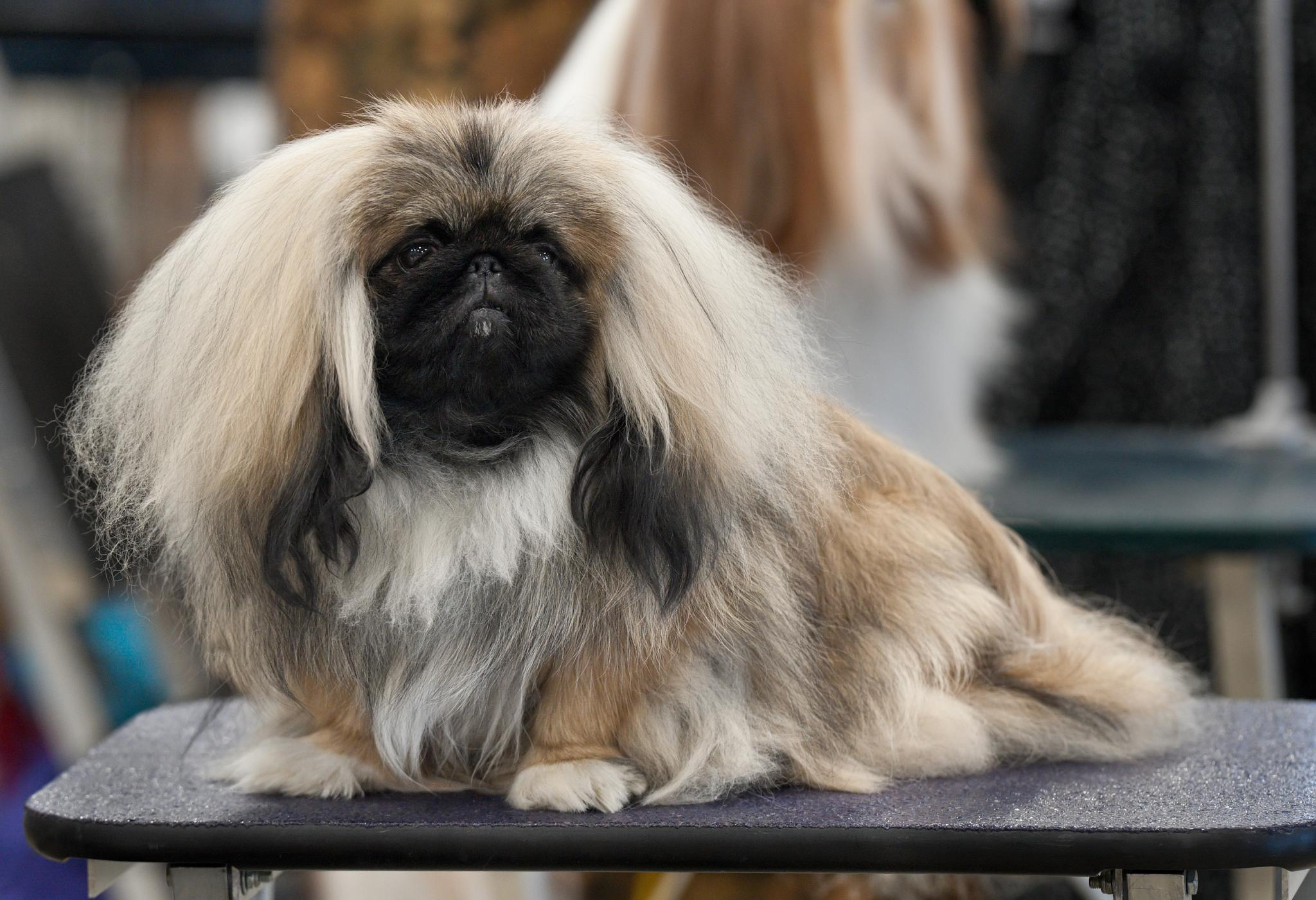 Pekingese